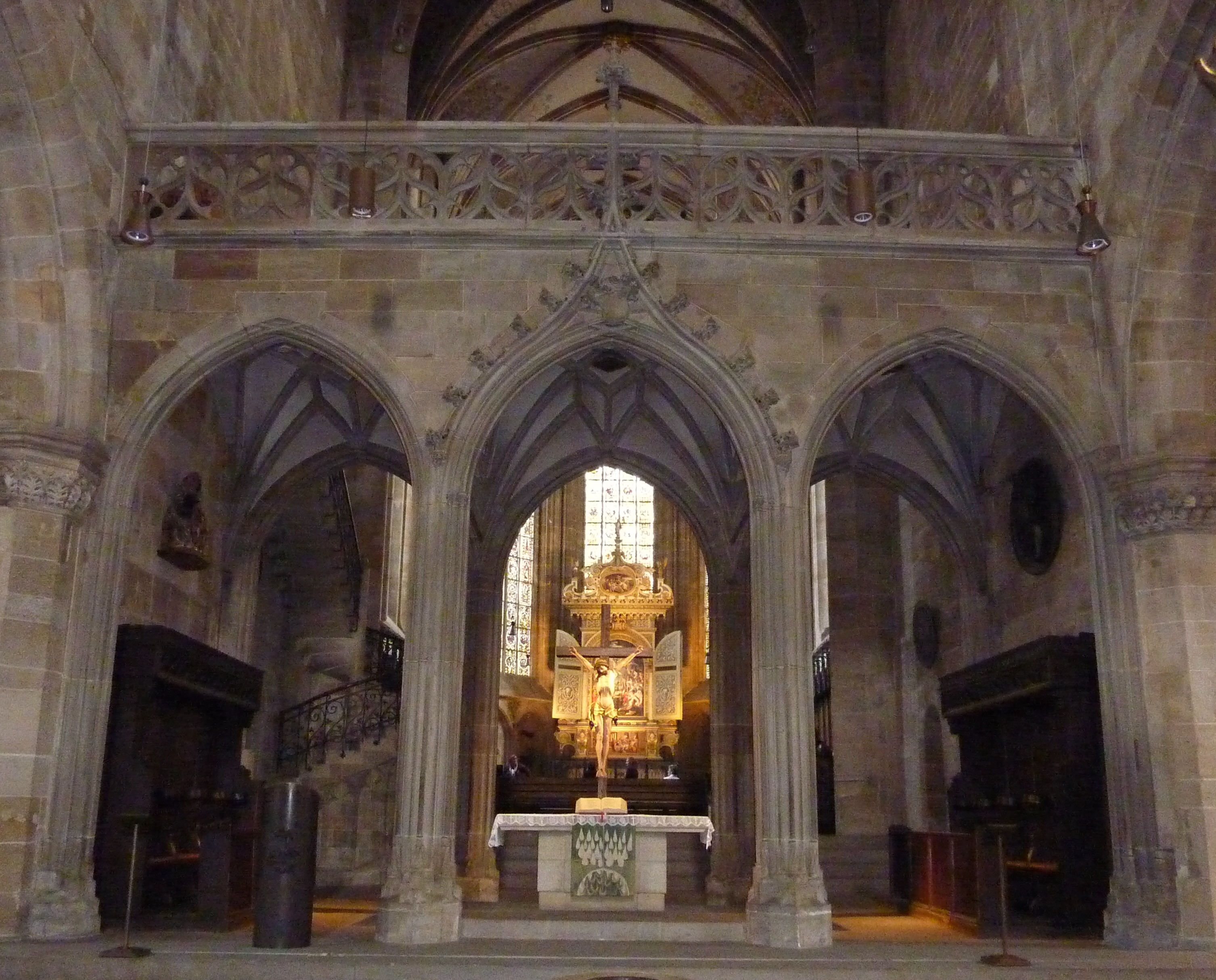 Lettner in der evangelischen Stadtkirche St. Dionys in Esslingen